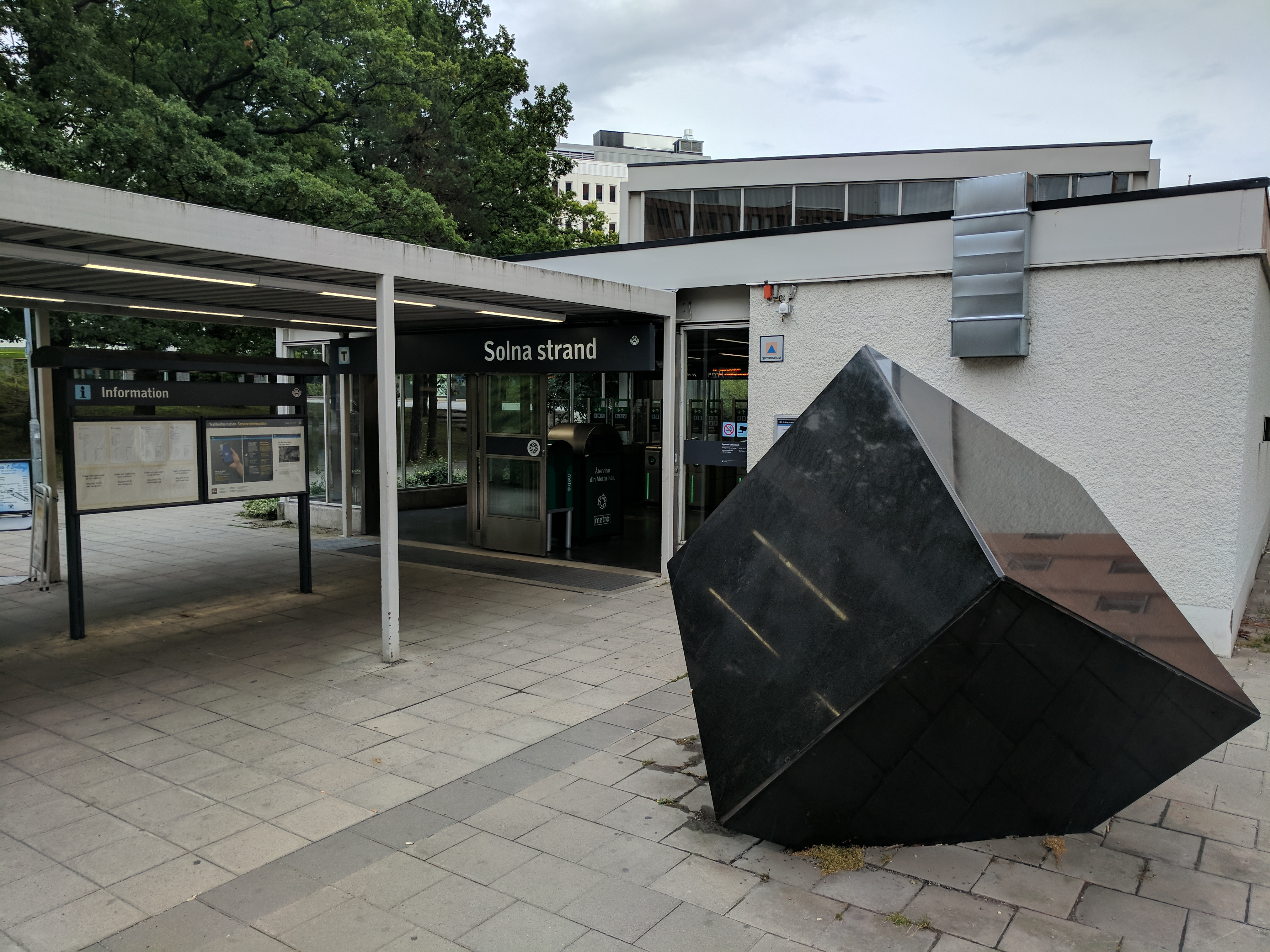 Solna Strand 20170902